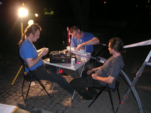 Praca przy spawaniu światłowodów. Widoczna otwarta mufa światłowodowa z kablami światłowodowymi. Operator układa zaspawane włókna w kasetach. Po lewej spawacz czyszczący włókna światłowodowe przed włożeniem do spawarki.